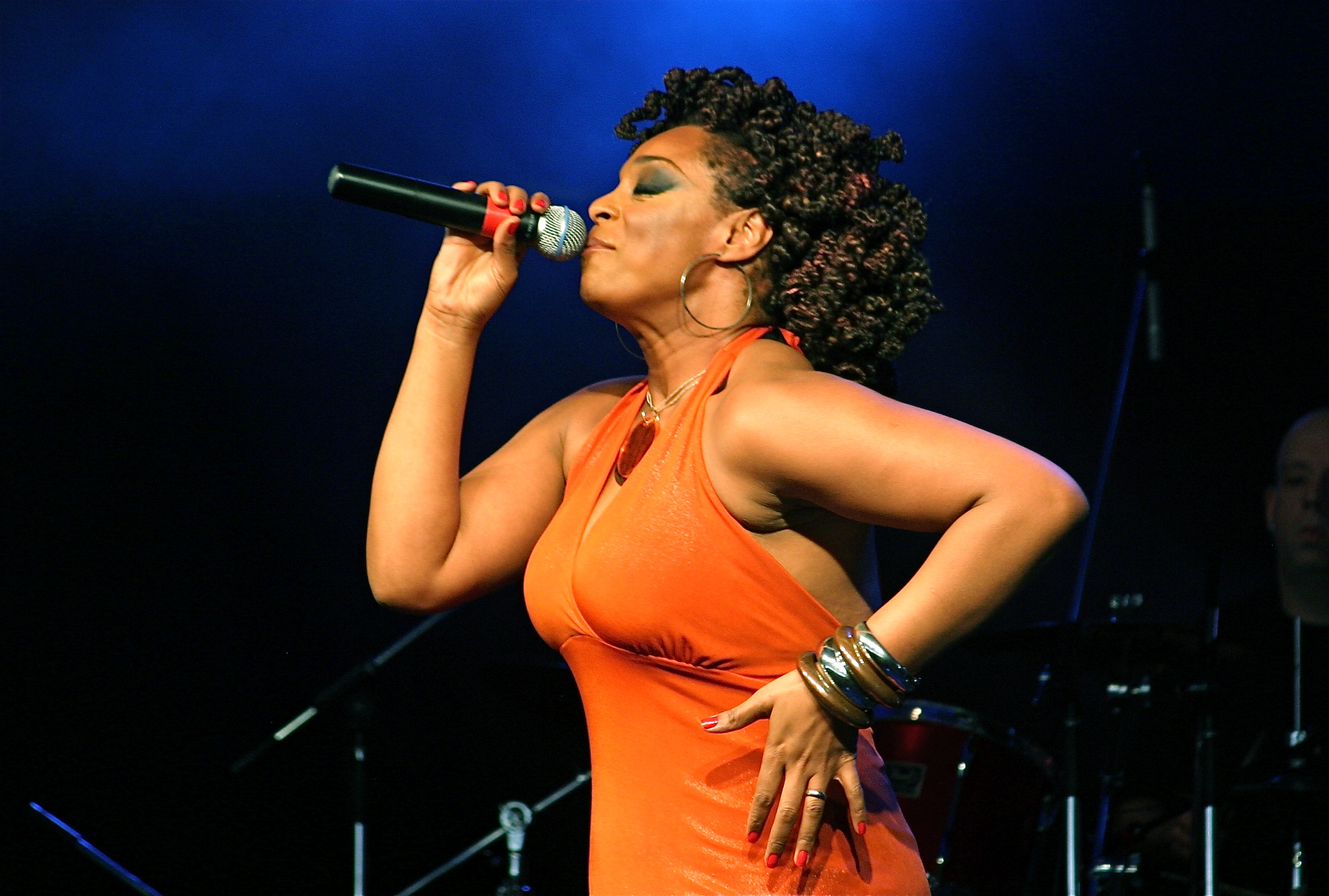 Foto do Show Samba Chic no SESC Taubaté